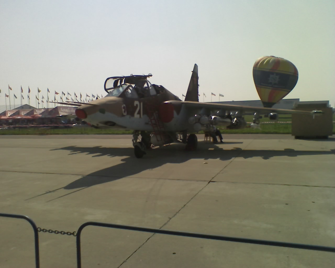 Штурмовик Су-25УБМ. Авиасалон MAKS-2007.